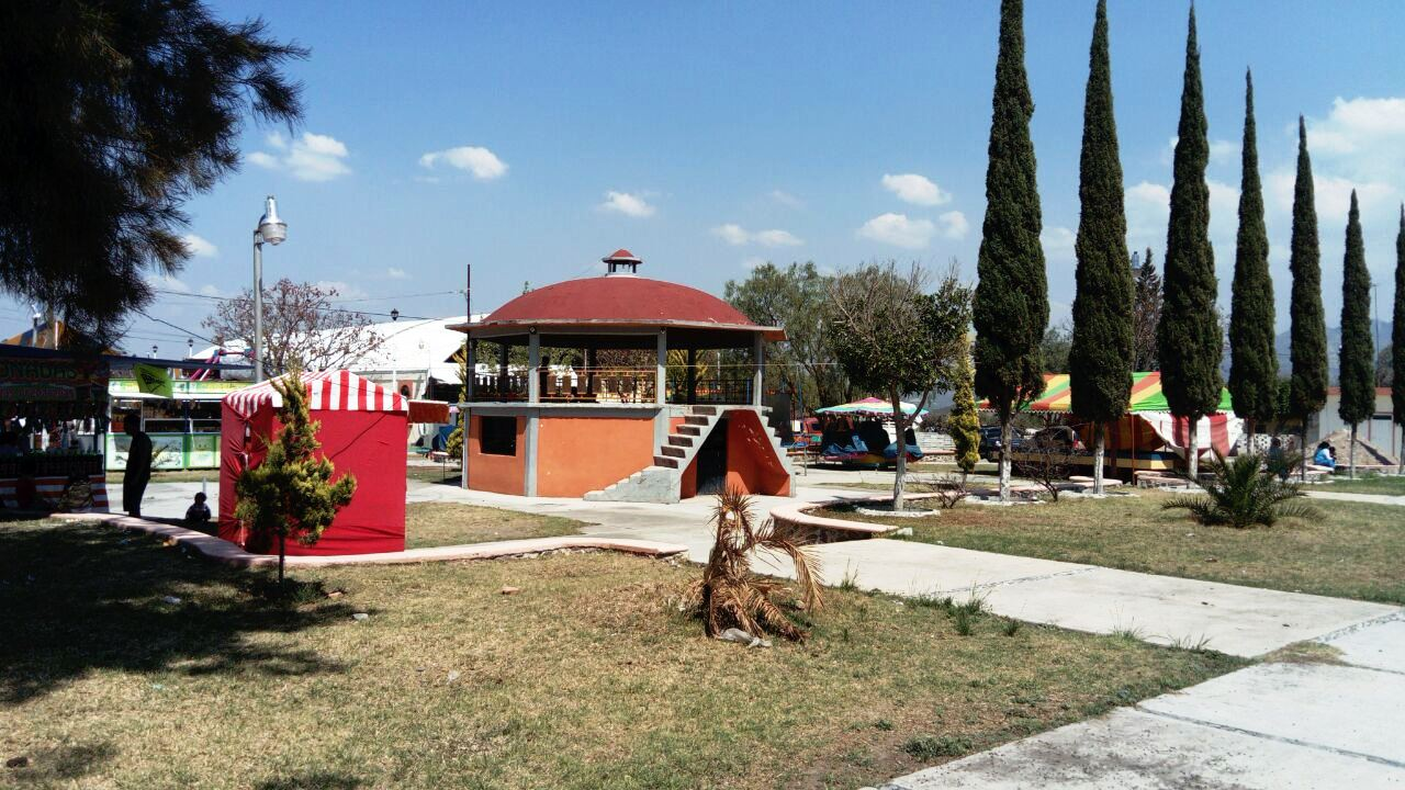 Colonia Cuauhtémoc en Actopan, Hidalgo, México.